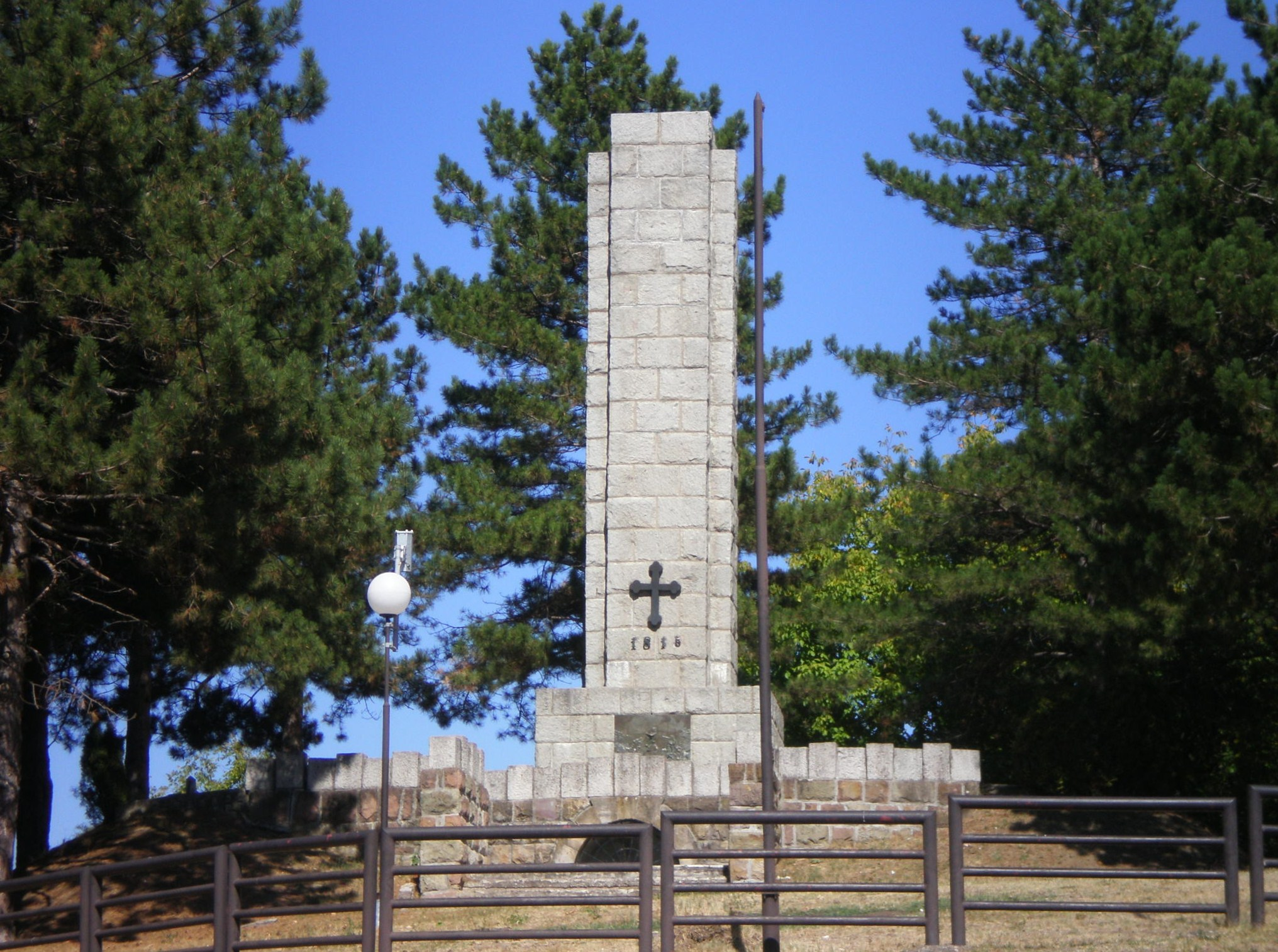 На Љубићу се налази меморијални комплекс посвећен Љубићкој бици, који је Република Србија 1983. године прогласила знаменитим местом од изузетног значаја. Комплекс се састоји од гранитног споменика Танаску Рајићу и православне цркве посвећене цару Лазару. Љубићка битка или битка на Љубићу се одиграла 1815. године, у току Другог српског устанка. Битка између Срба и Турака одвијала се на брду Љубић 4 километра североисточно од Чачка. У борби се истакао Танаско Рајић, који је јуначки погинуо бранећи српске топове од Турака. Срби су у тој бици остварили победу, која је улила великоморално оснажење народу, самопоуздање и подигла Србе масовно на оружје.